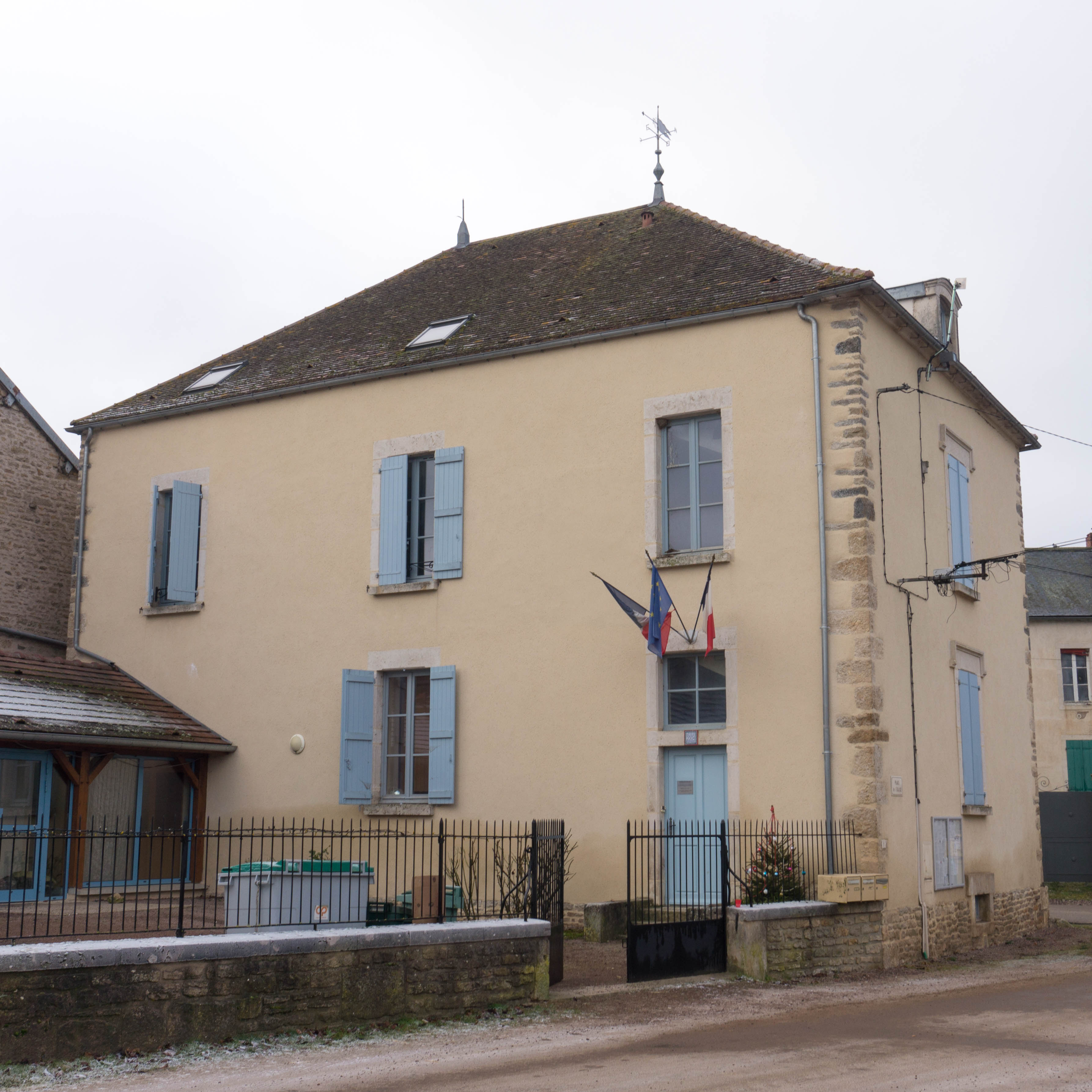 Mairie de Noidan